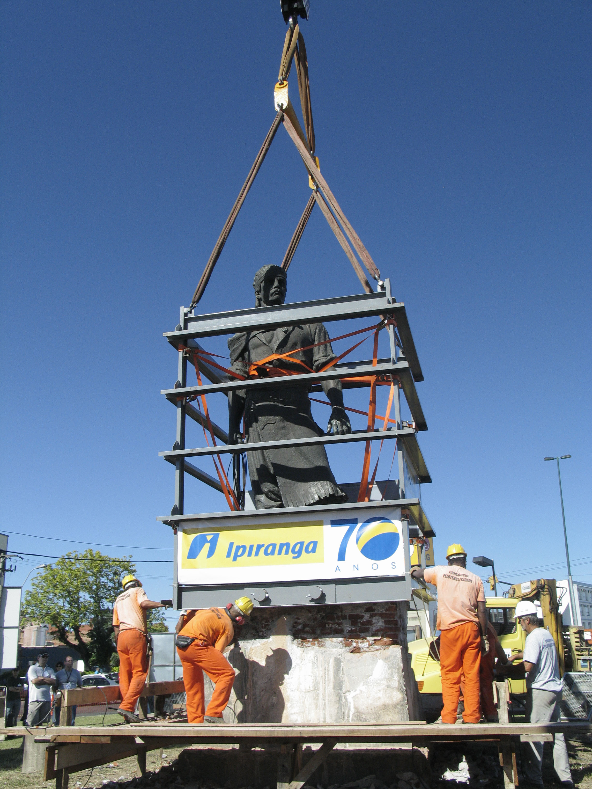 Tašlḥiyt/ⵜⴰⵛⵍⵃⵉⵜ: Laçador